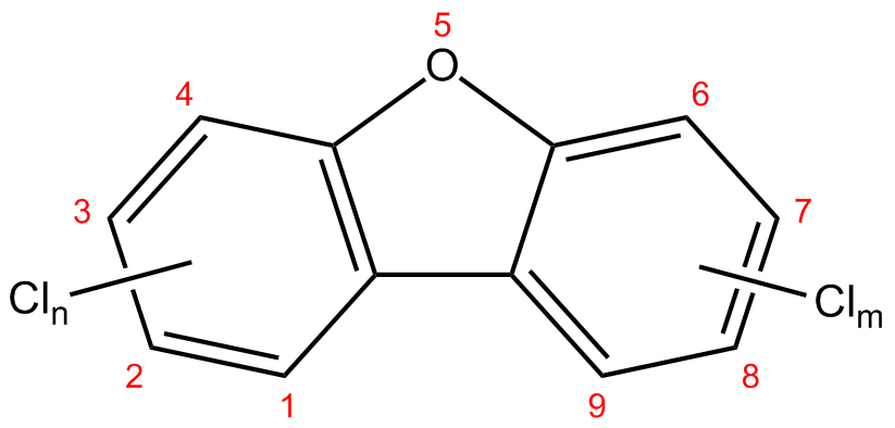 Esquema numerat d'un dibenzofurà m,n policlorat